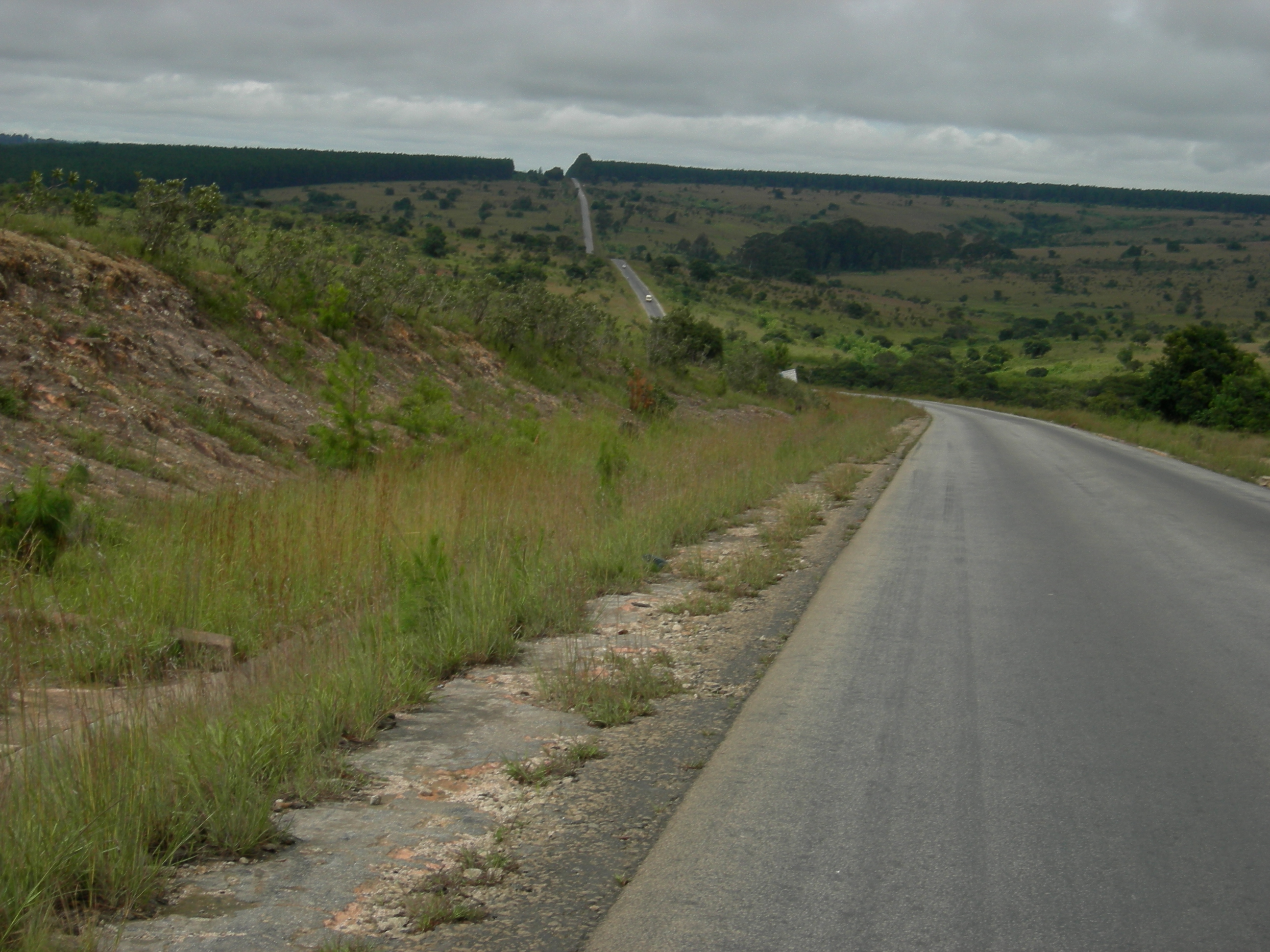 Mbeya, Tanzania